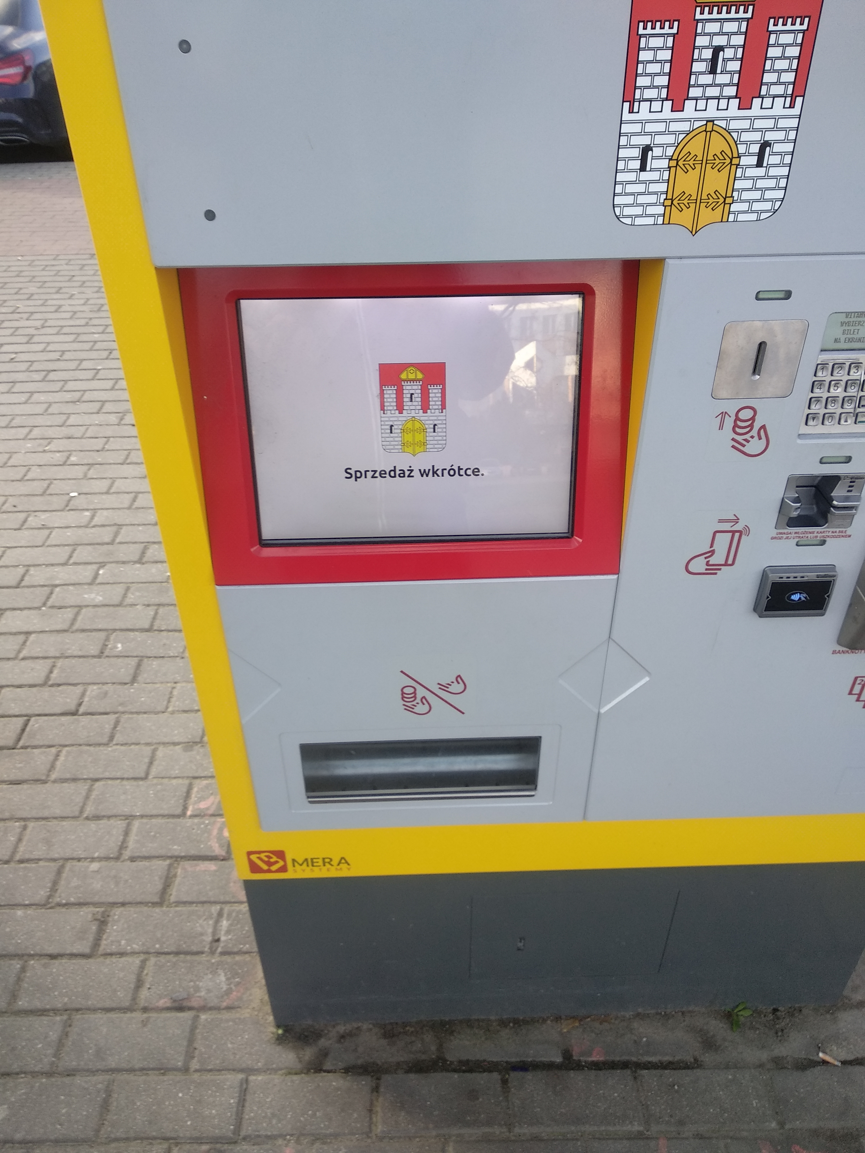 Biletomat komunikacji miejskiej we Włocławku (nieczynny, ul. Okrzei, 2019 r.)